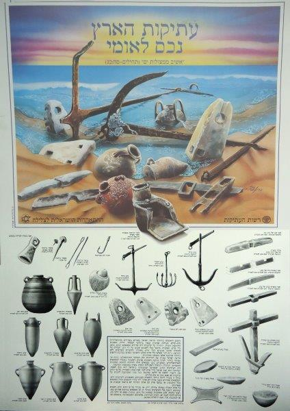 כרזה לימודית המתארת שרידי ספינות טרופות ומטענים המתגלים על קרקעית הים. רשות העתיקות, עיצוב שלמה כהן